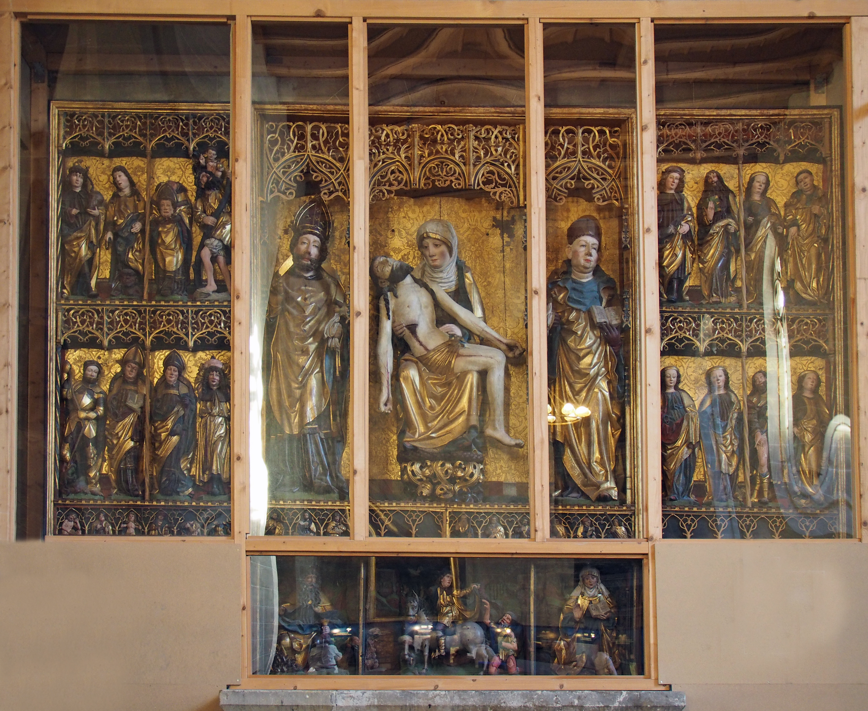 Gotischer Flügelaltar, Vesperaltar um 1500, unbekannter Künstler, St. Benedikti, Quedlinburg, Sachsen-Anhalt